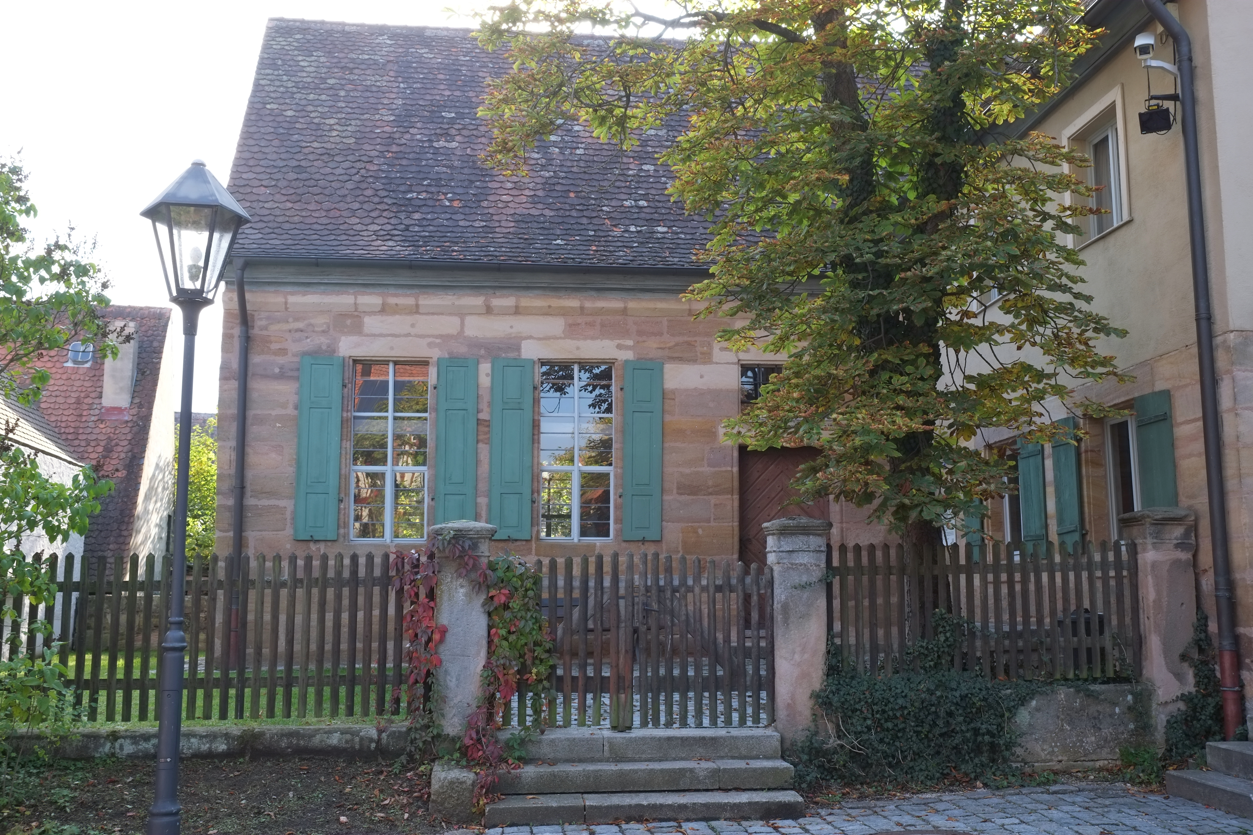 Synagoge in Georgensgmünd im Landkreis Roth (Bayern/Deutschland)